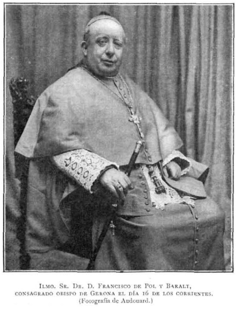 Retrato de Francisco de Polt y Baralt; fotografía de Pablo Audouard.